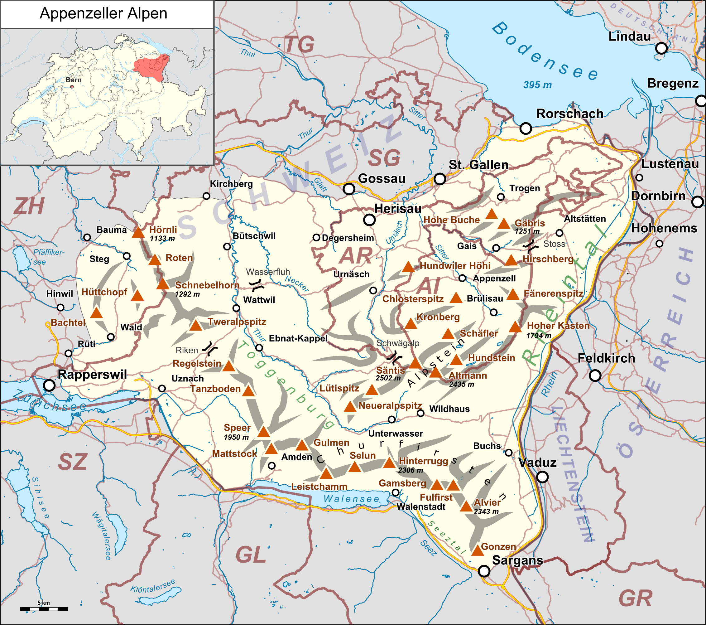 Lagekarte der Appenzeller Alpen